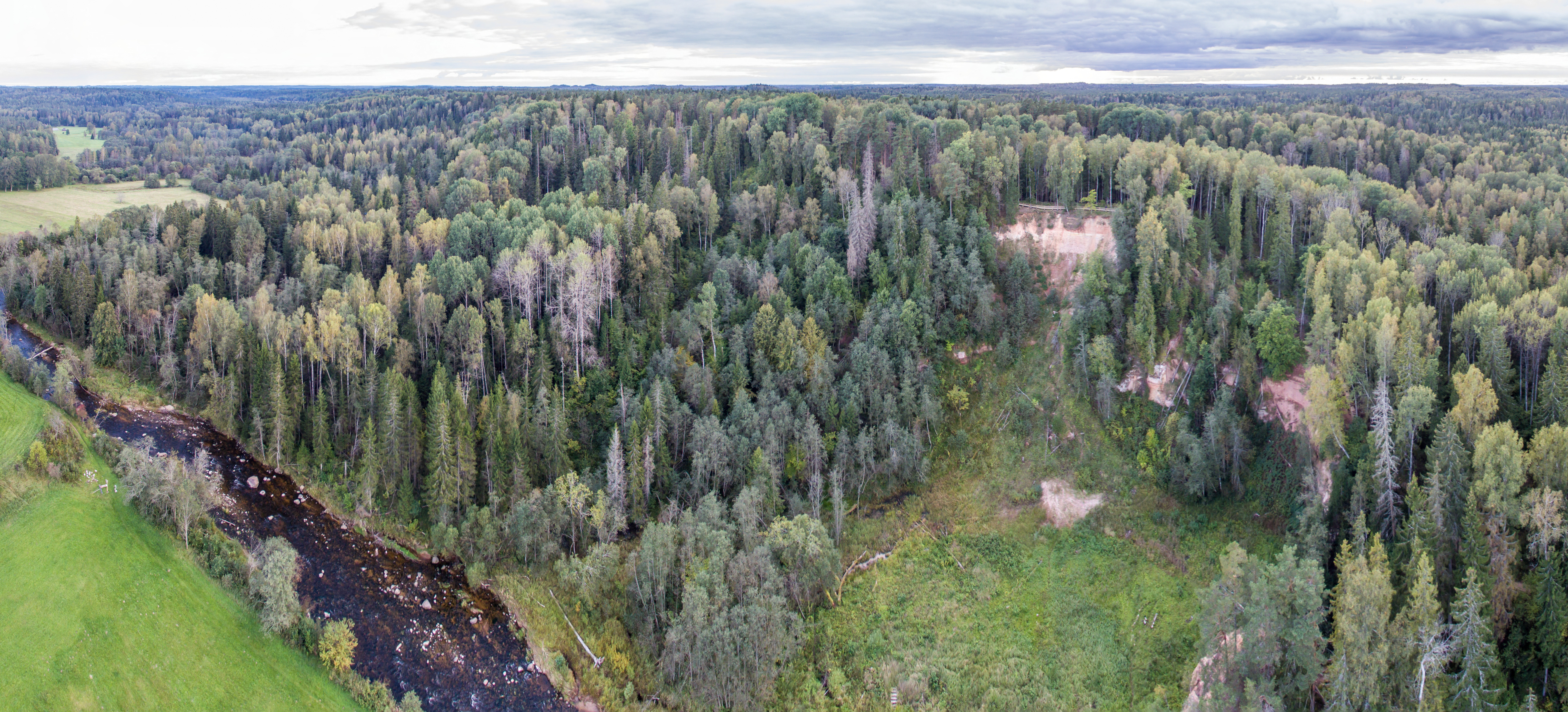 Zvārdes iezis no putna lidojuma